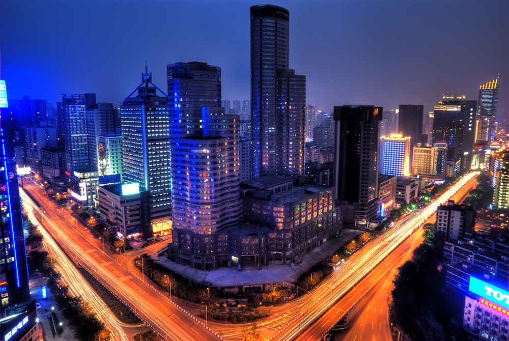 夜幕下的红旗河沟-世纪英皇大厦